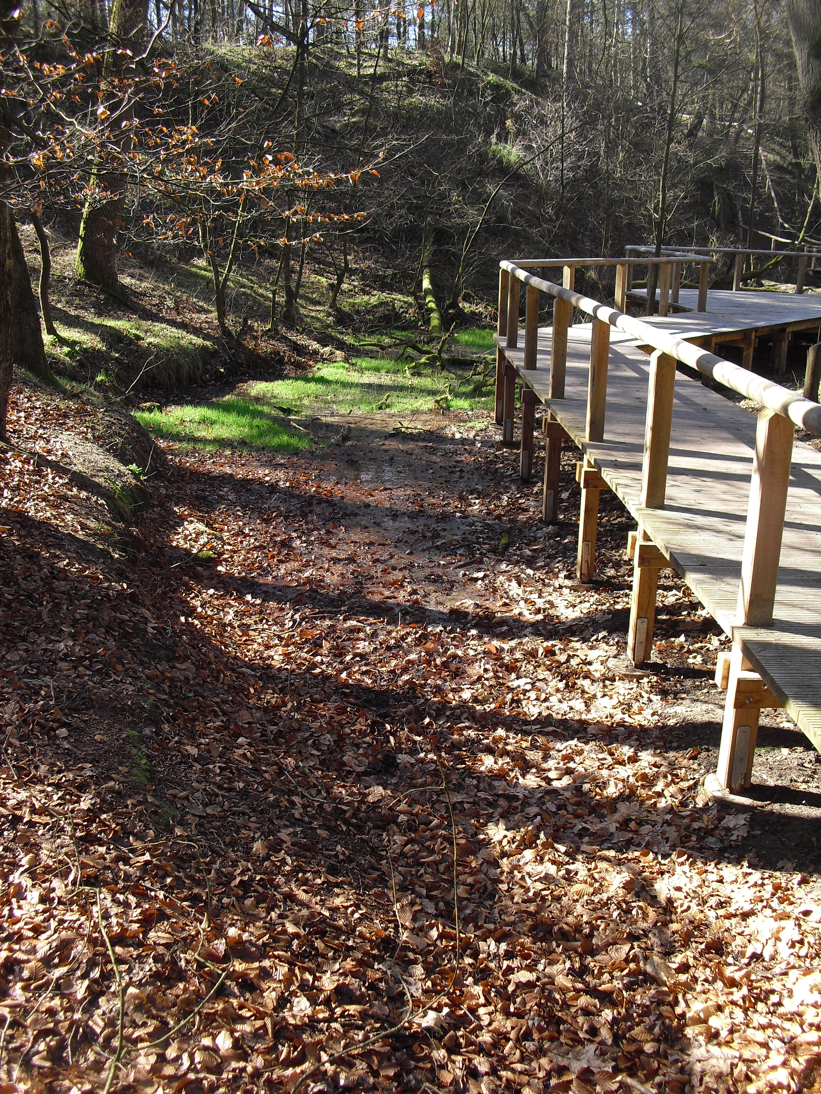 Emsquelle